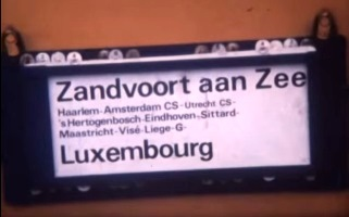 Zuglaufschild des internationalen Samstags-Intercity-Zuges Zandvoort aan Zee - Luxembourg, Sommer 1985